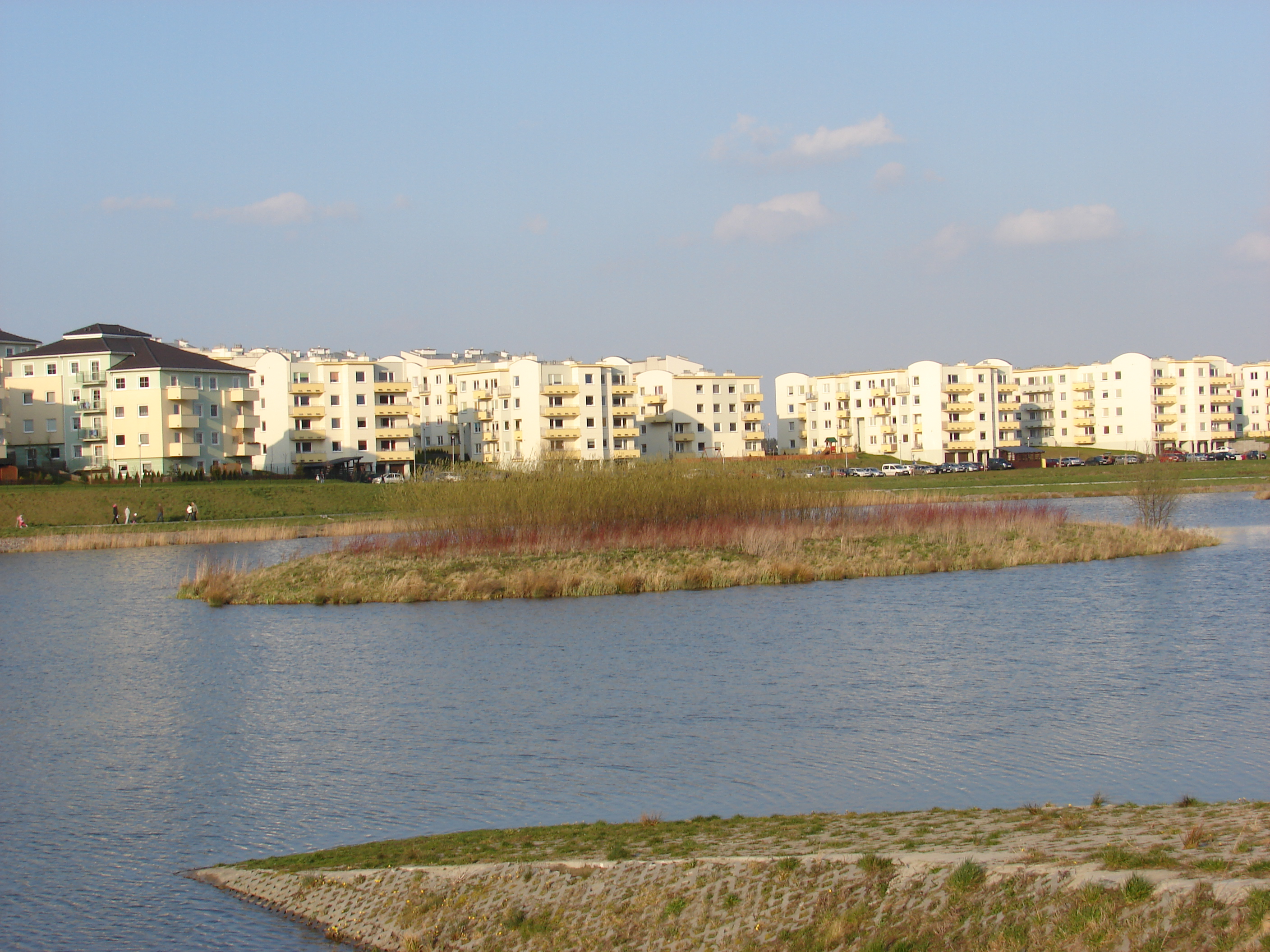 Gdańsk Zakoniczyn, osiedle Pięć Wzgórz - widok na fragment. Zbiornik zasilany przez Potok Oruński.